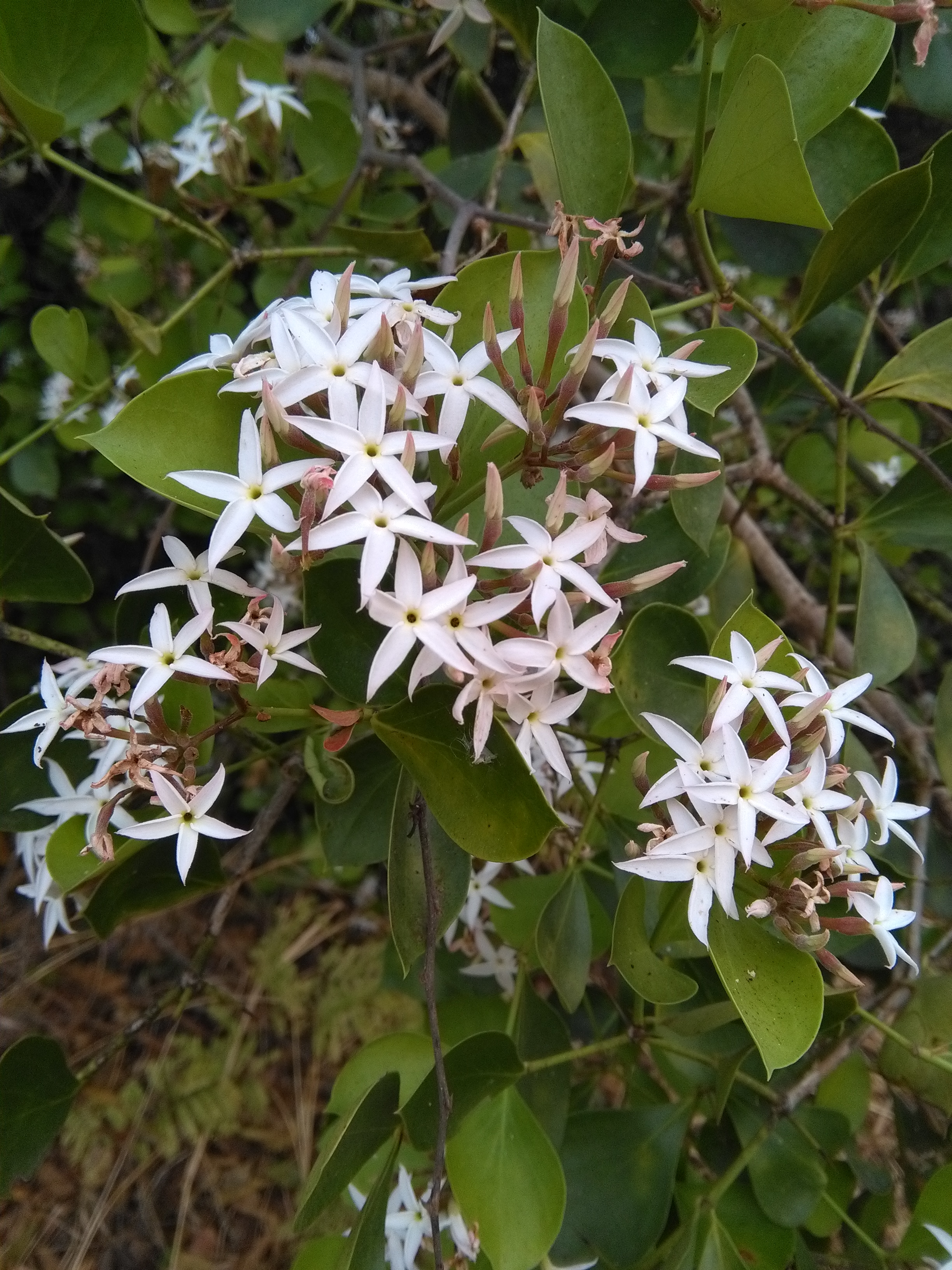 မြန်မာဘာသာ: ခံပင္